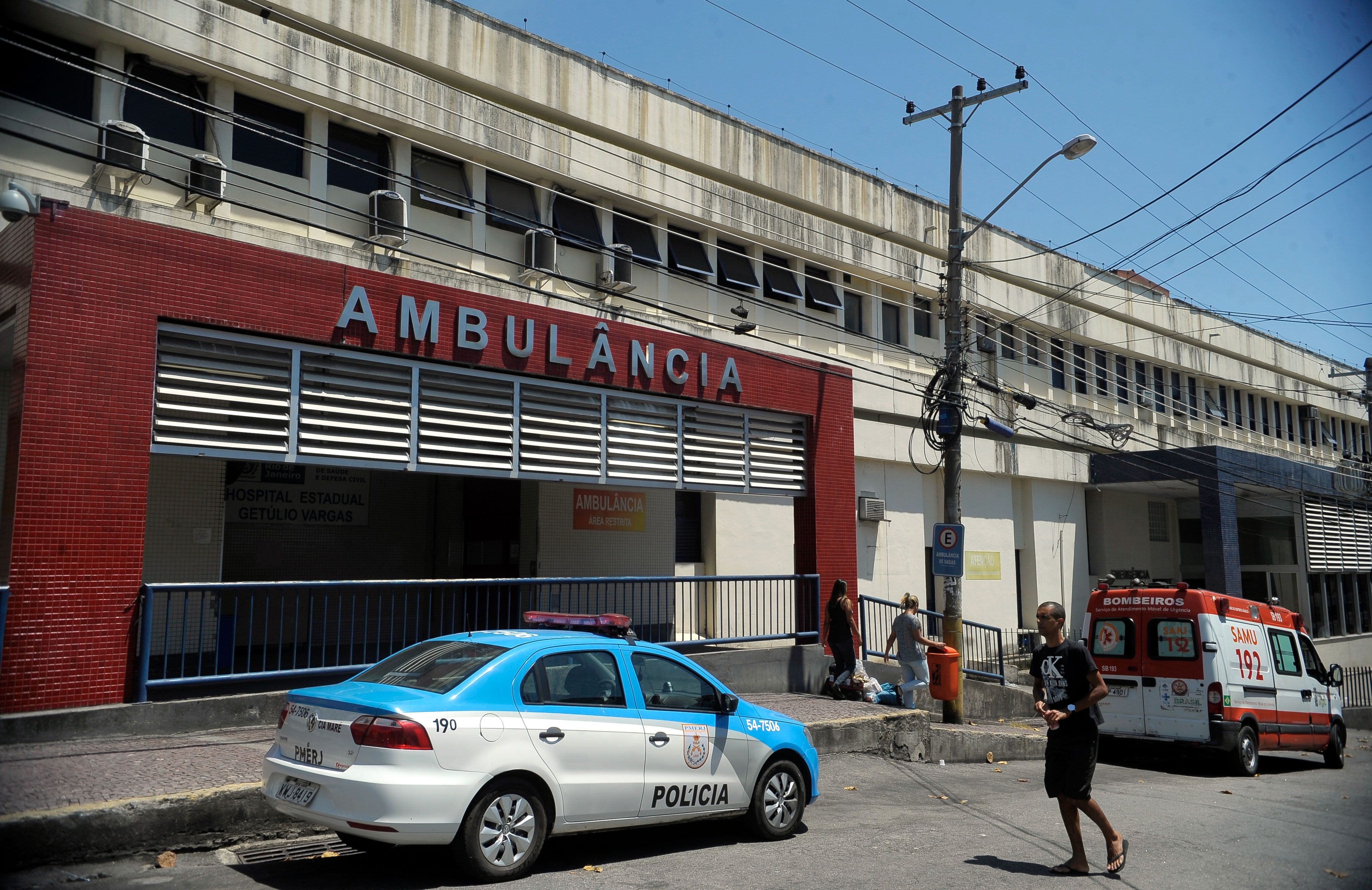 Rio de Janeiro - Hospital Estadual Getúlio Vargas, na Penha, zona norte da cidade